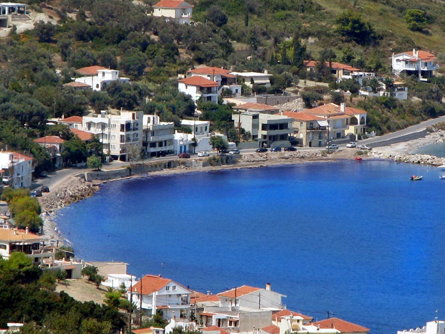 Πλατάνα Κύμης